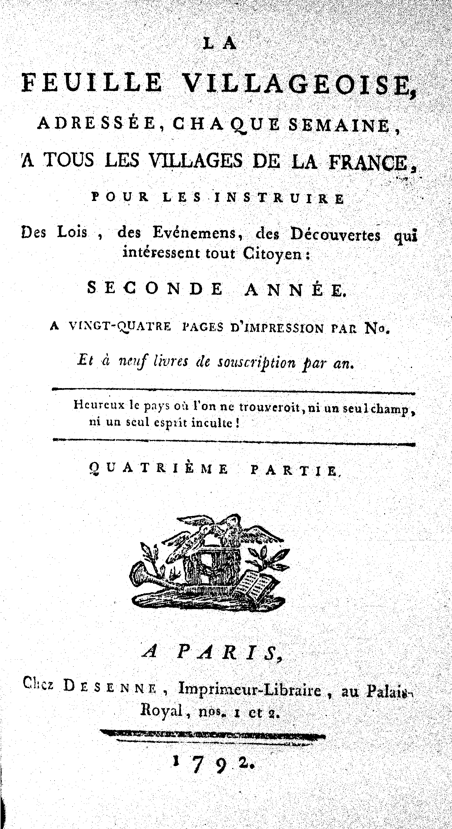 La Feuille villageoise : adressée, chaque semaine, à tous les villages de France, pour les instruire des loix, des évènements, des découvertes qui intéressent tout citoyen, proposée par souscription aux propriétaires, fermiers, pasteurs, habitans et amis des campagnes. N27-52 (mars-octobre 1792).